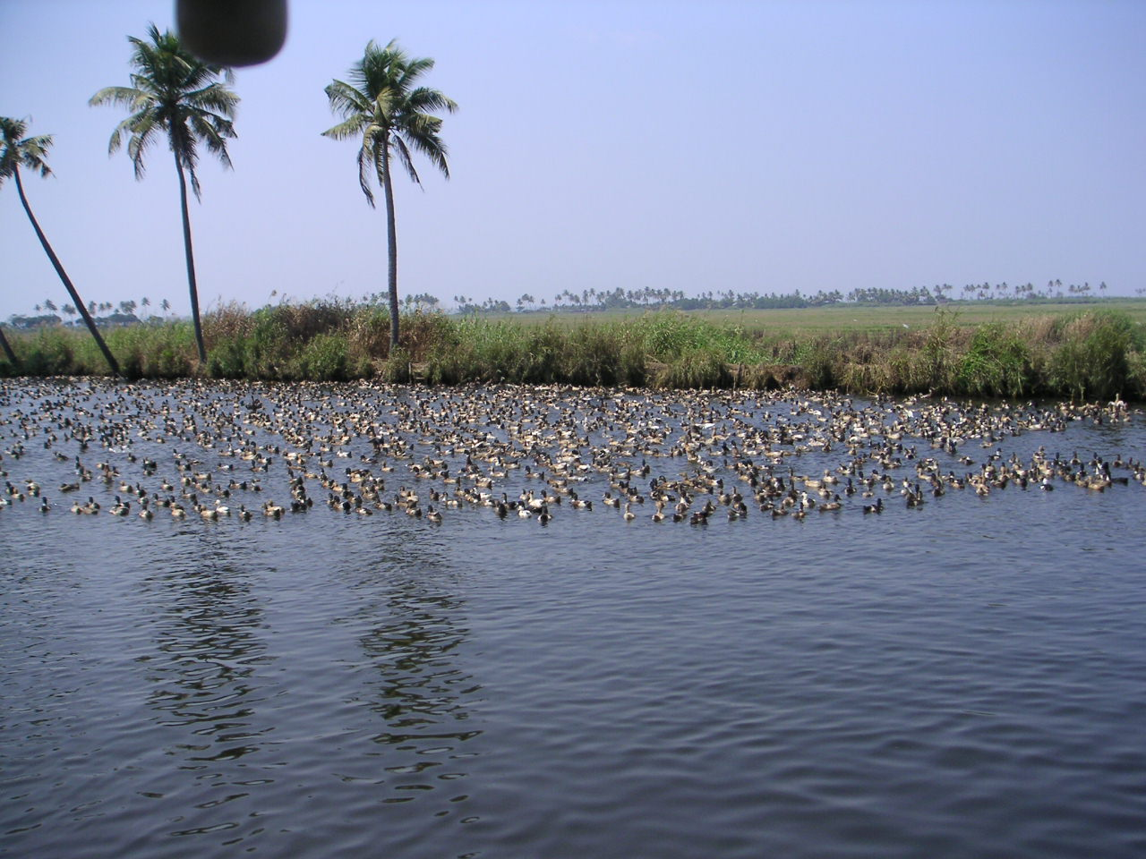 Kerala Backwaters